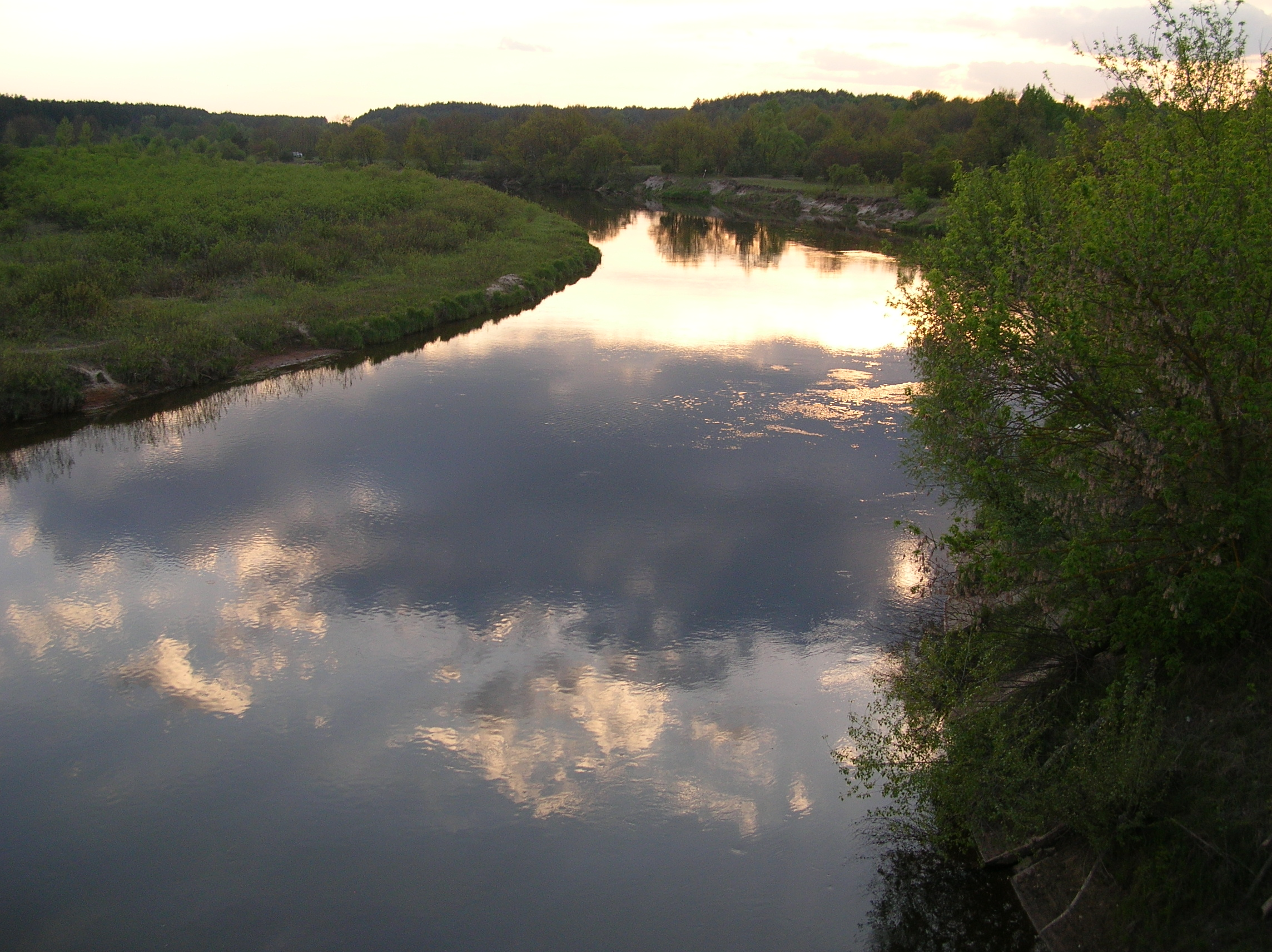 Uzh River (Northern Ukraine) in Chernobyl, rzeka Uż w pobliżu ujścia do Prypeci w Czarnobylu